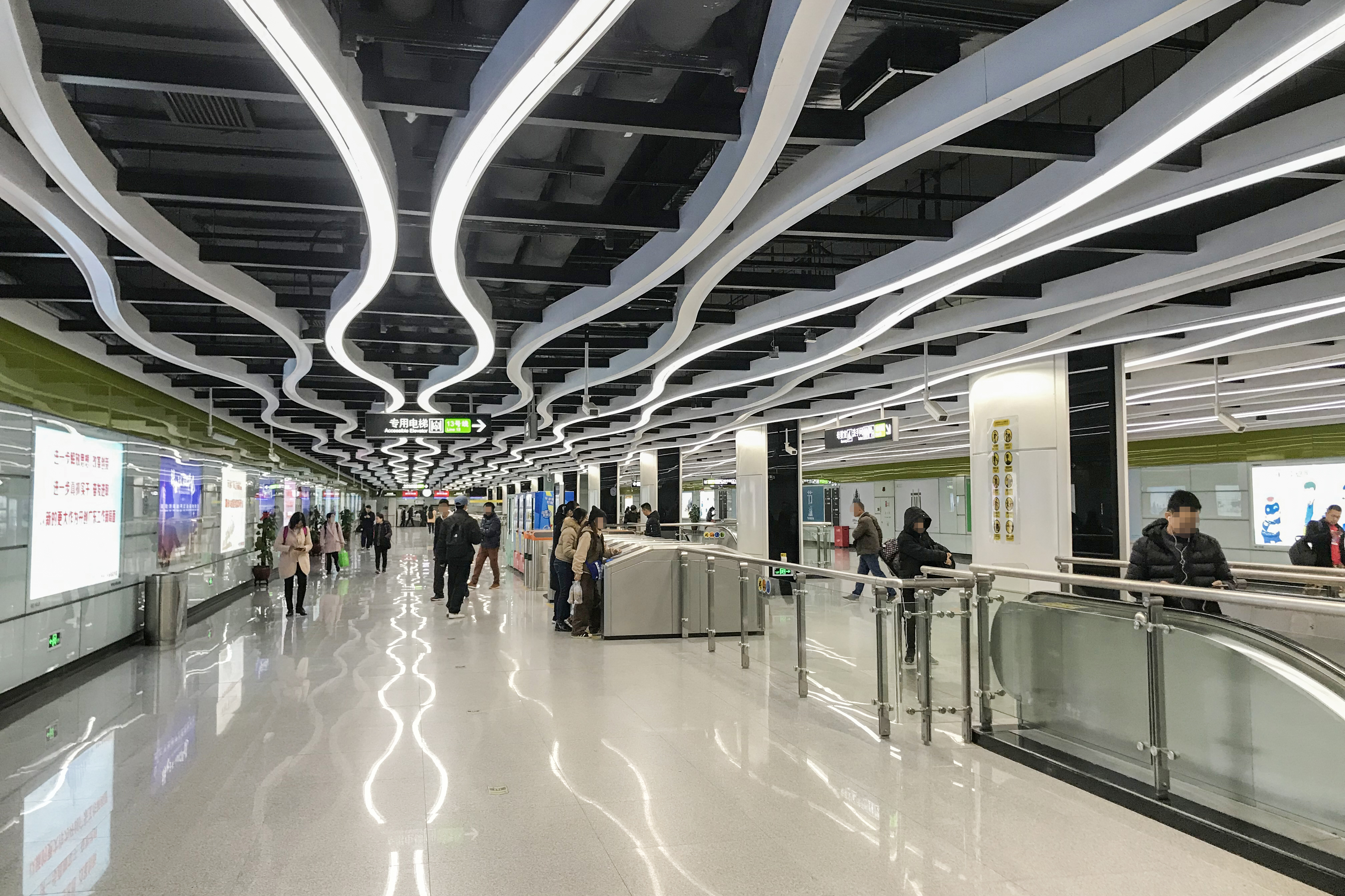 广州地铁白江站